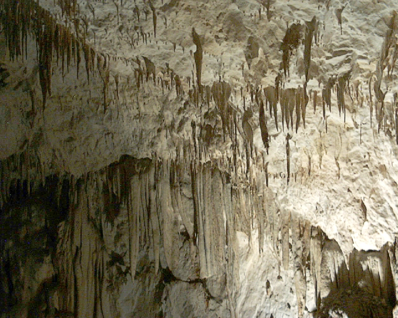 Grotte del Cavallone